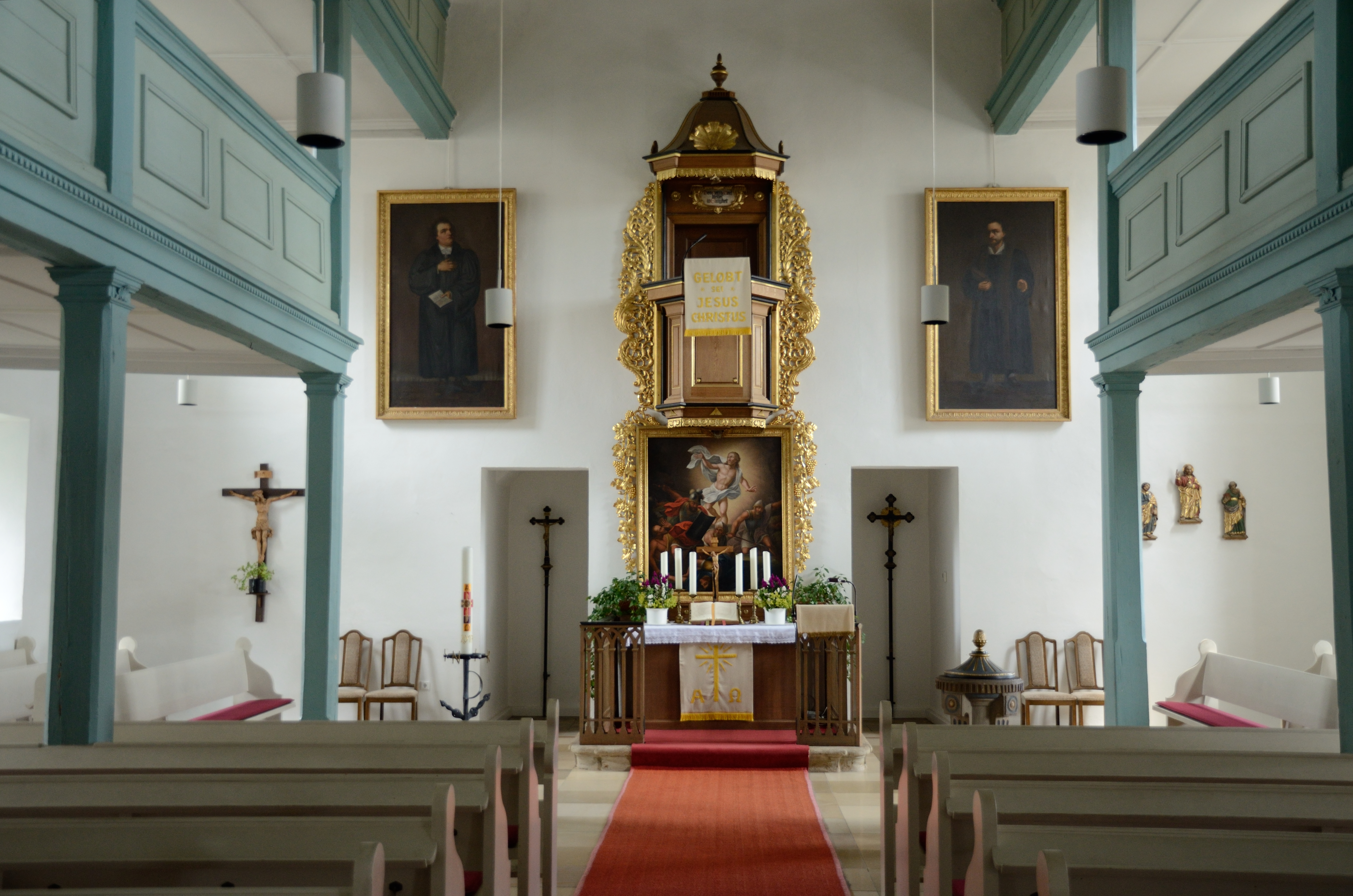 St. Alban, Sachsen bei Ansbach. Kanzelaltar, Gemälde von Martin Luther (links) und Philipp Melanchthon, Statuen von Petrus, Jesus und Paulus (ganz rechts)